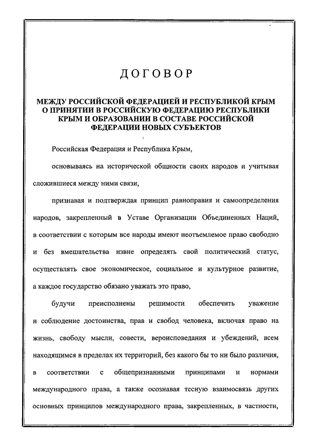 Договор между Российской Федерацией и Республикой Крым о принятии в Российскую Федерацию Республики Крым. 1 страница.